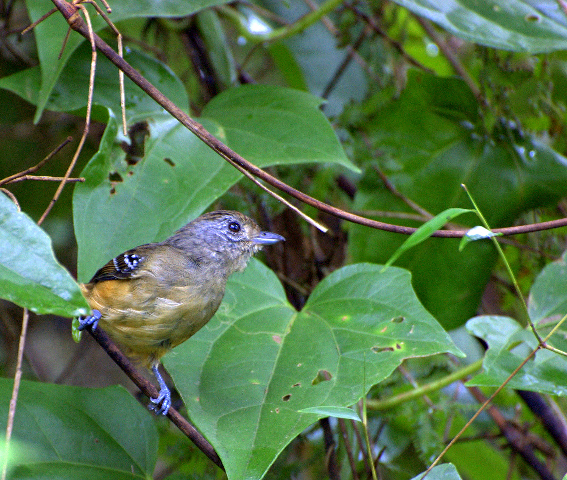 Rodovia Empei Hiraide SP-139, próximo à cidade de Registro-SP